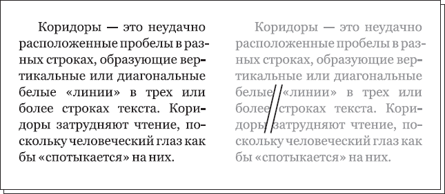 Набранный текст, преобразованный в формат .jpg.